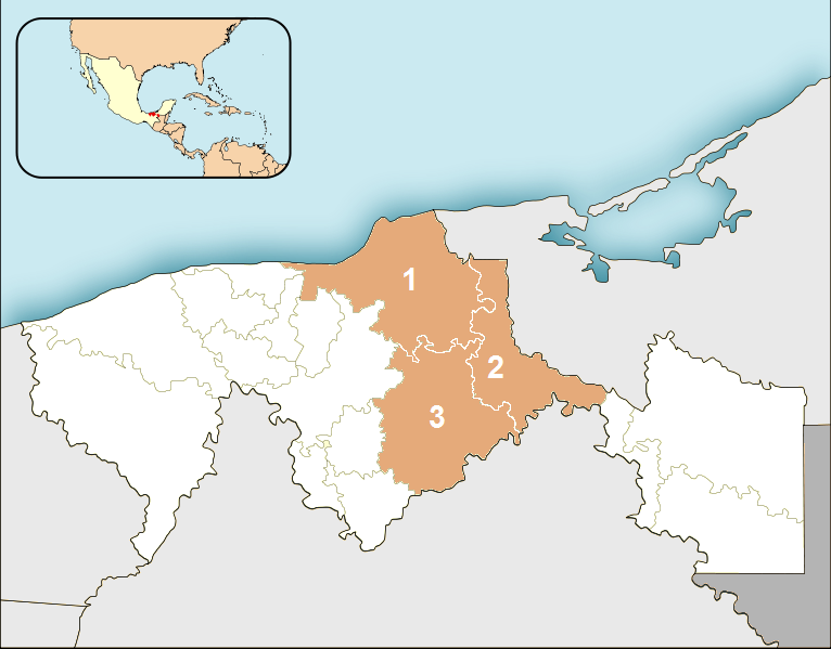 Mapa de la Sub Región de Los Pantanos, en el estado de Tabasco